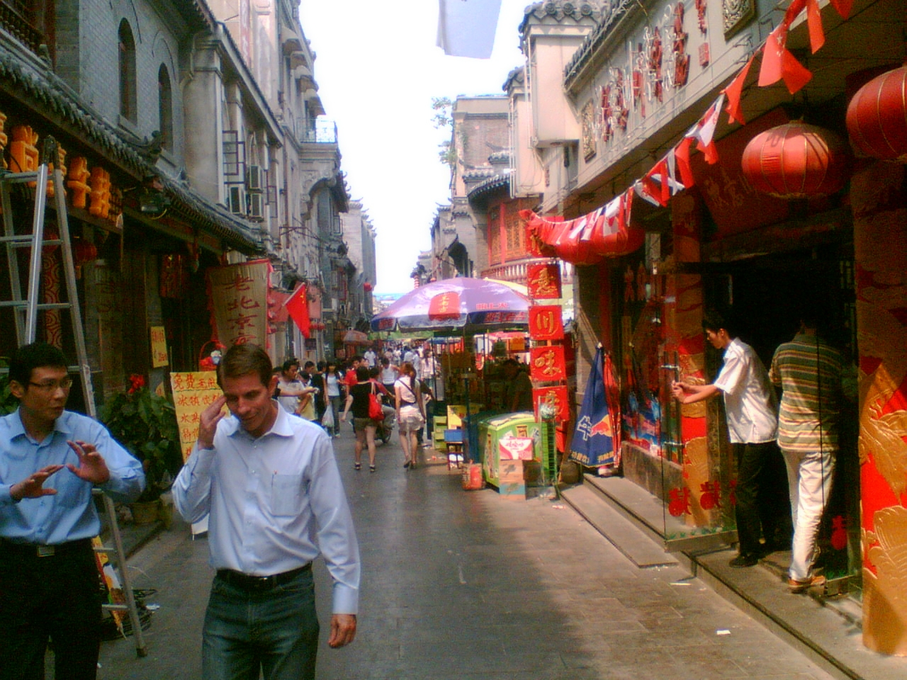 山东省济南市芙蓉街